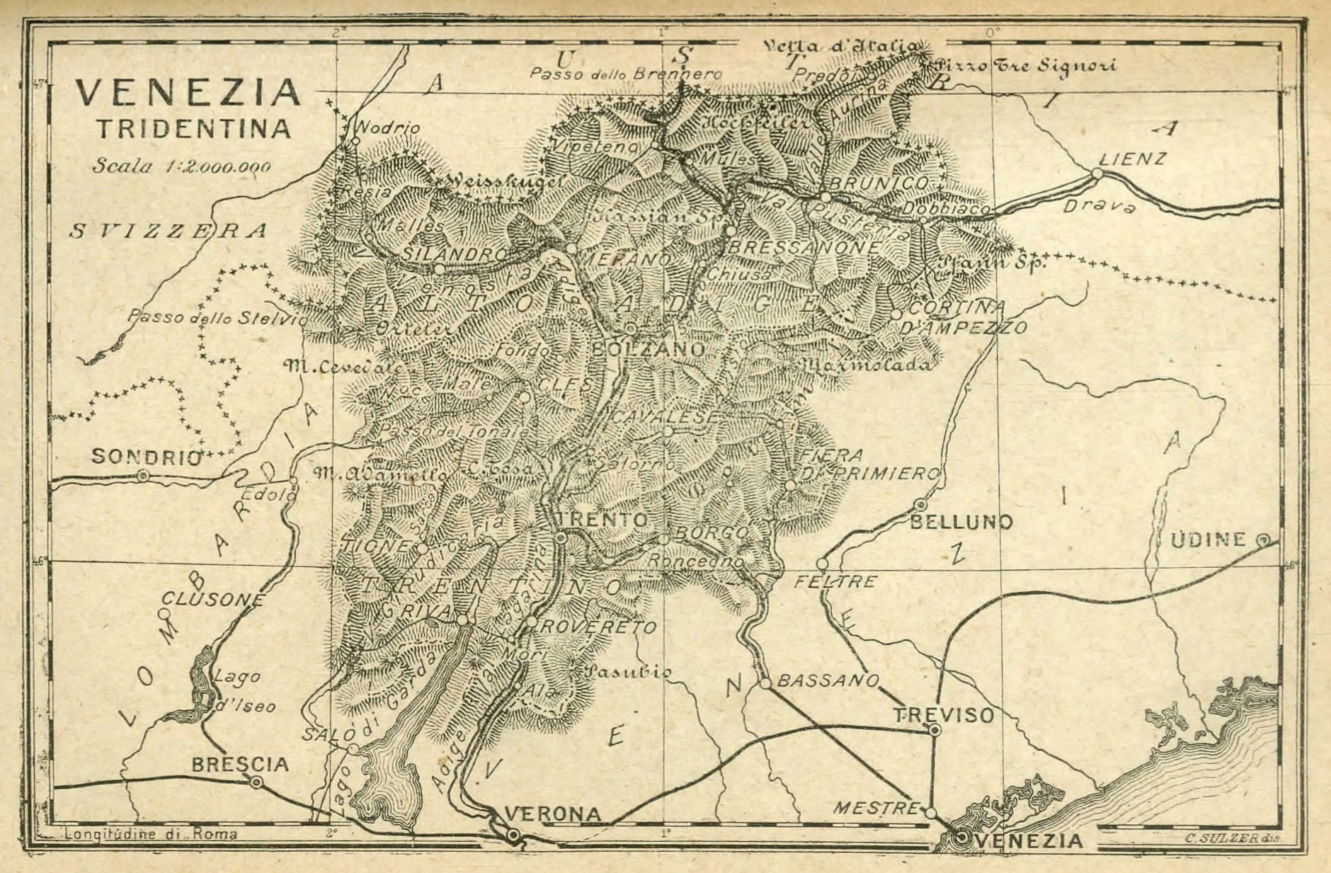 Mappa della Venezia Tridentina tratta da: Salvi, Edvige (1858-1937). Venezia Tridentina. Descrizione storico-geografica per le scuole e per le biblioteche scolastiche e popolari . Milano : A. Vallardi, 1921, p. 5.